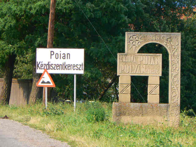 Polyán